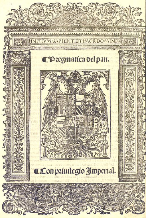 Pragmàtica, 1539-10-11: "En la villa de Madrid a onze dias del mes de Octubre de mil quinientos y trenta y nueve años